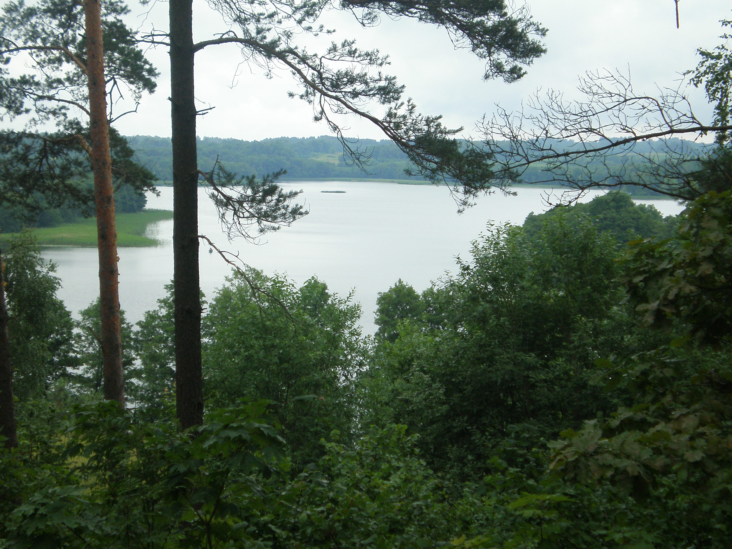 Ūkojas Lake in Aukštaitija NP